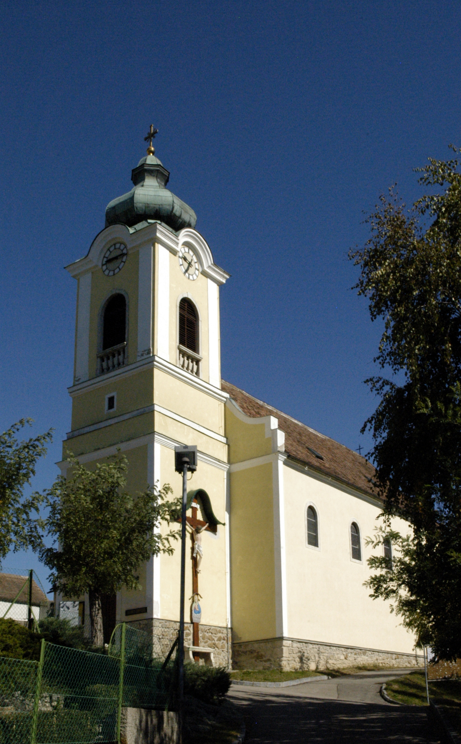 Kath. Pfarrkirche hl. Pankraz in Roggendorf, Gemeinde Röschitz